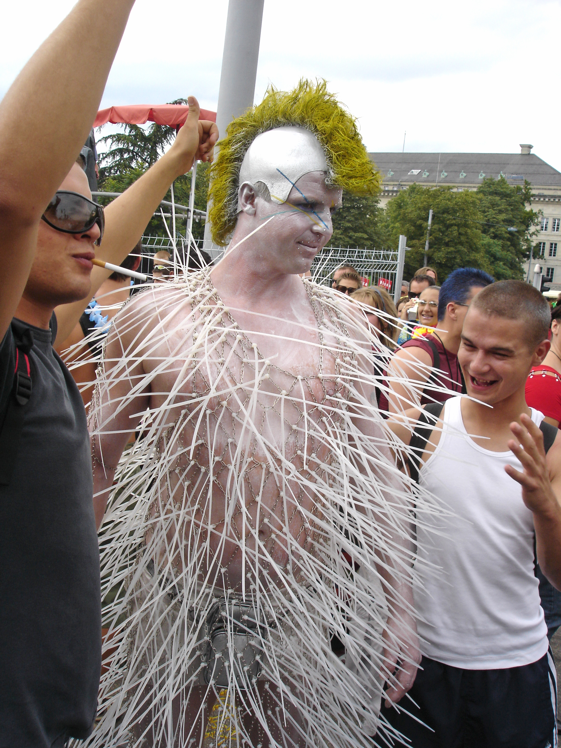 Zürich Street Parade 2005.